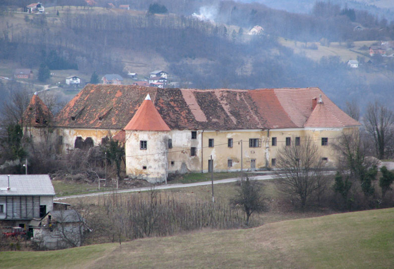 Dvorac Mali Tabor